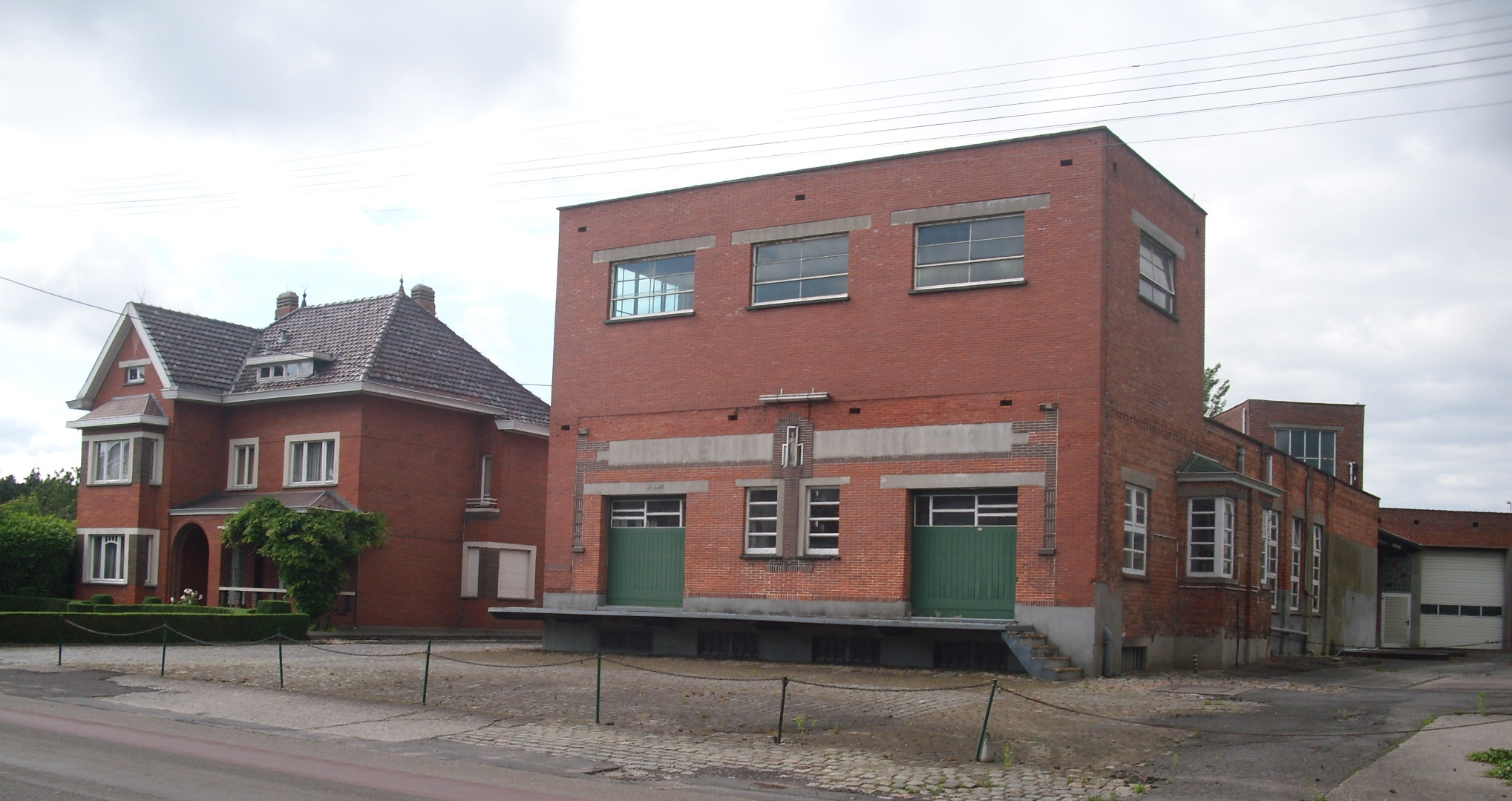 Zuivelfabriek Lactil met eigenaarswoning - Felix D"Hoopstraat - Tielt - West-Vlaanderen - België